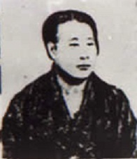 小政、1871年（明治4年）前後の写真。